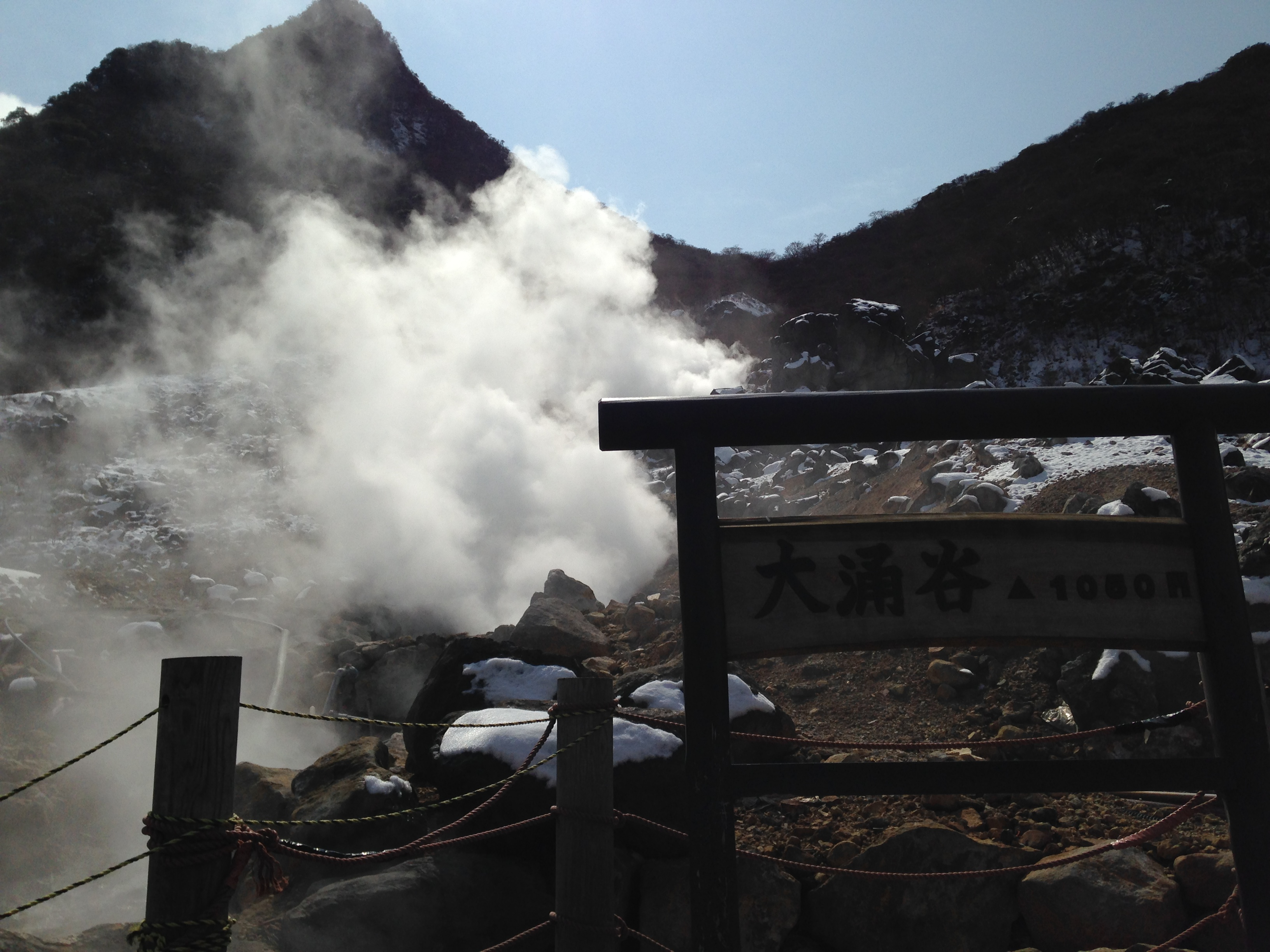 大涌谷の湯煙と冠ヶ岳